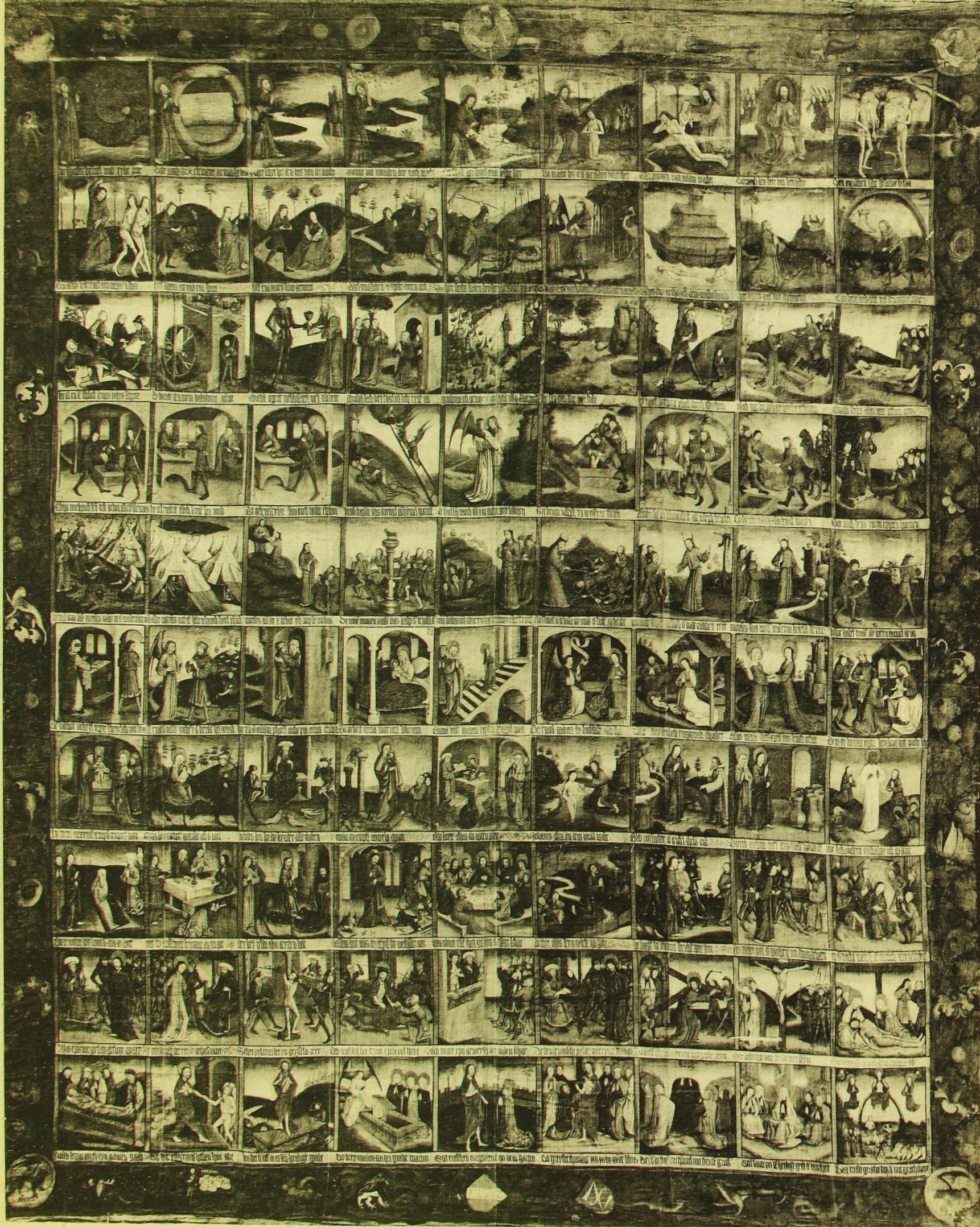 Großes Zittauer Fastentuch. Öl auf Leinwand, 820 cm x 680 cm, geteilt in zehn Reihen von je neun Bildern, je 65 : 65 cm. In der vorösterlichen Fastenzeit wurde mit dem Bild der Altar der Johanniskirche in Zittau verhüllt. In: Cornelius Gurlitt: Beschreibende Darstellung der älteren Bau- und Kunstdenkmäler des Königreichs Sachsen, Dresden: Meinhold, 1907, H. 30: Zittau (Stadt), S. 25 f. Heute zu sehen im Museum Kirche zum Heiligen Kreuz, Zittau